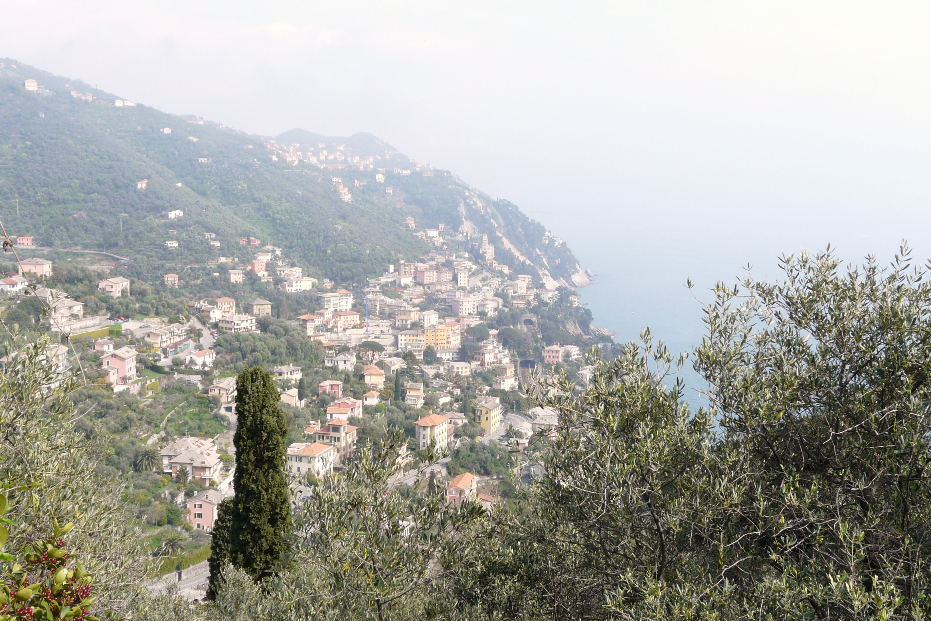 Zoagli, Liguria, Italia